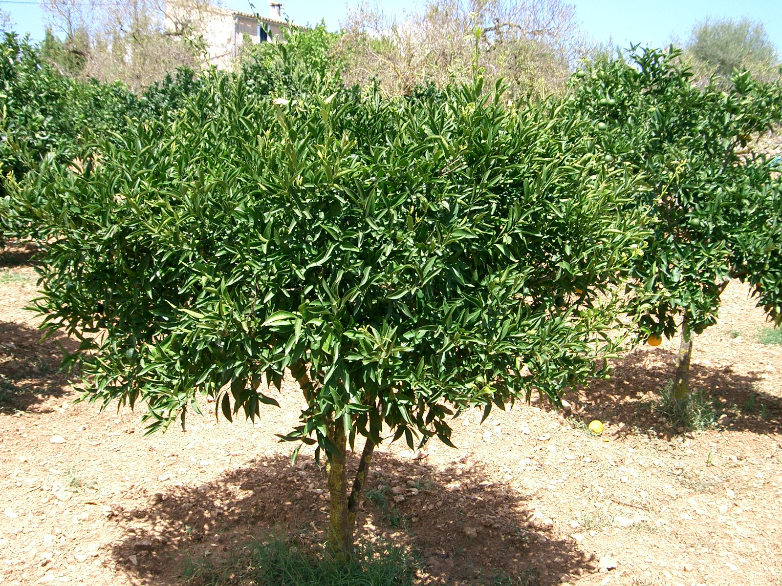 Citrus deliciosa. Son Carrió, Mallorca.